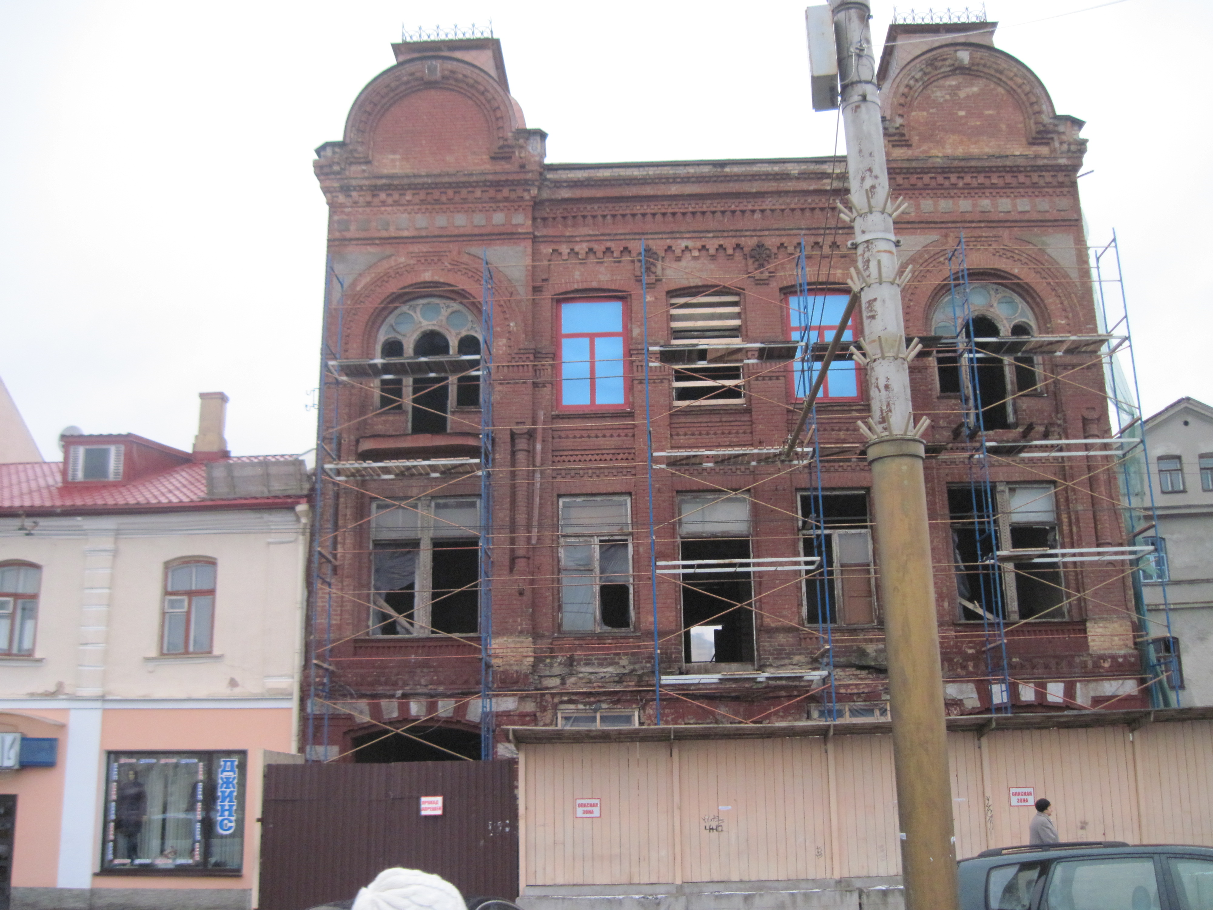 Беларуская (тарашкевіца): Былы дом купца Мураўёва ў Гродне